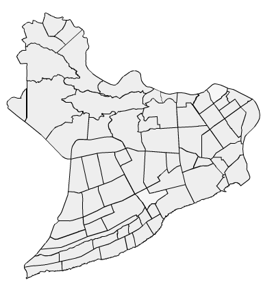 Sectores del Distrito Nacional, Ciudad de Santo Domingo de Guzmán